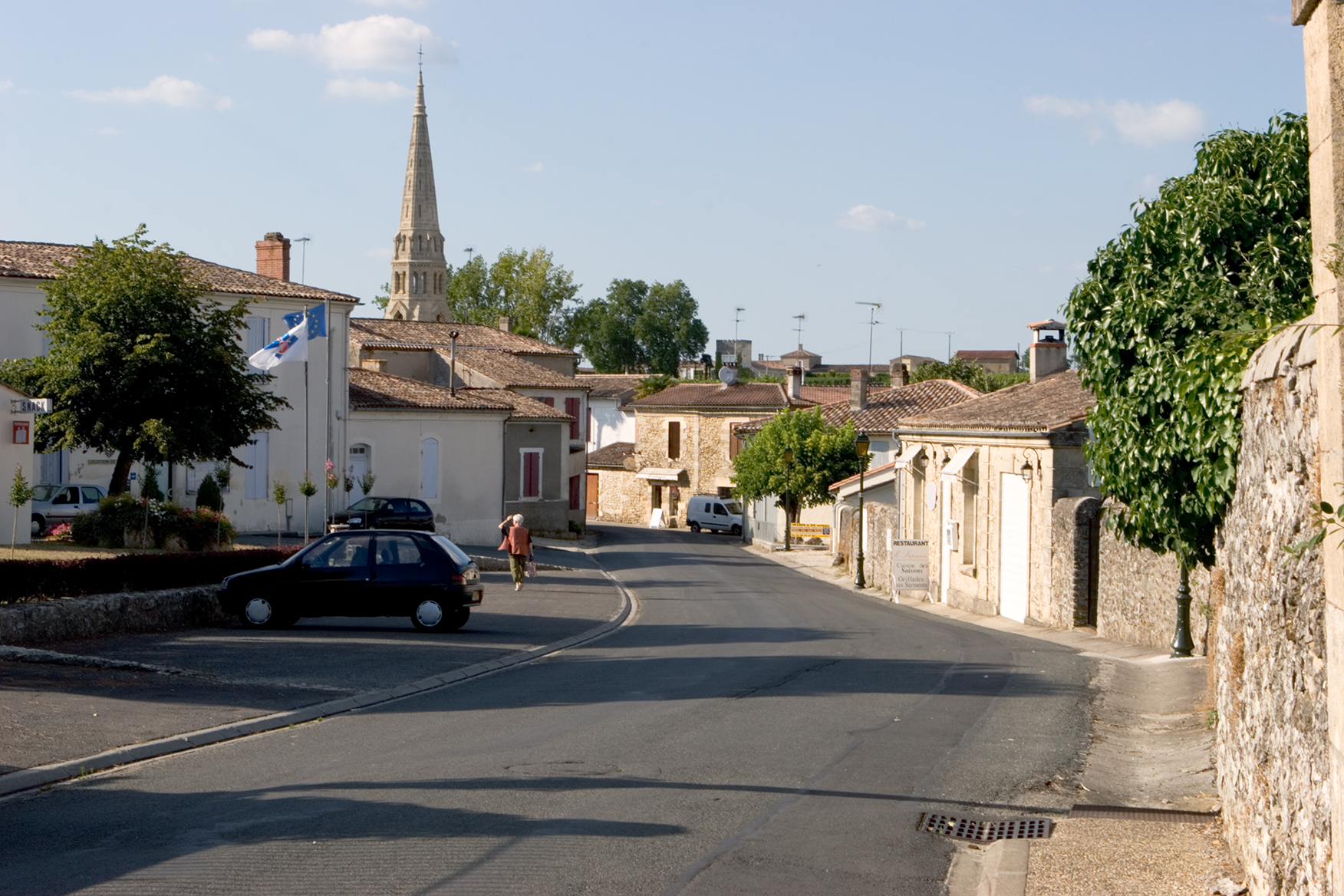 Village et vignoble, Sauternes, France.